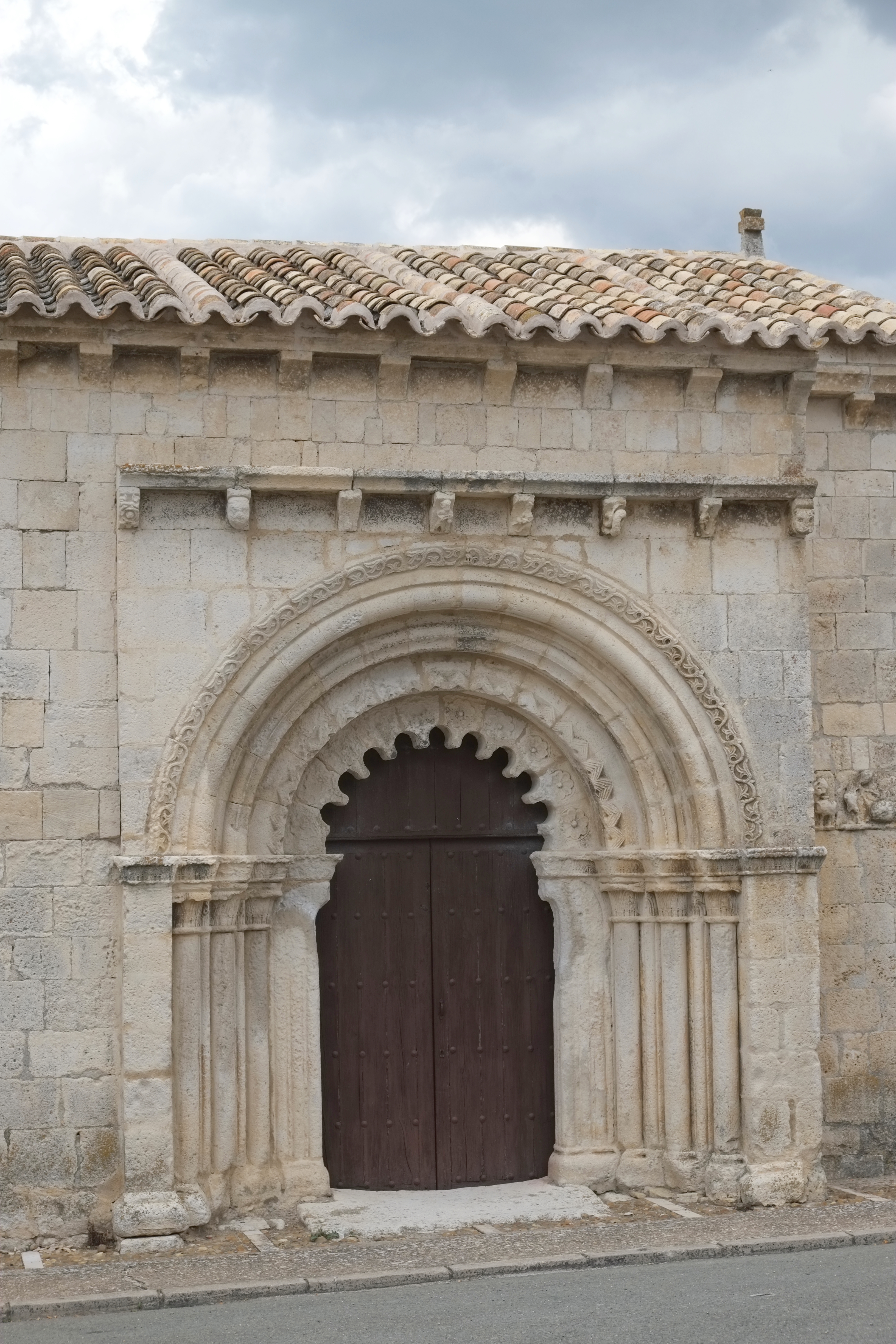 Kirche San Bartolomé in Campisábalos in der Provinz Guadalajara in Spanien